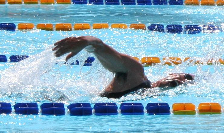 Nado del estilo crol